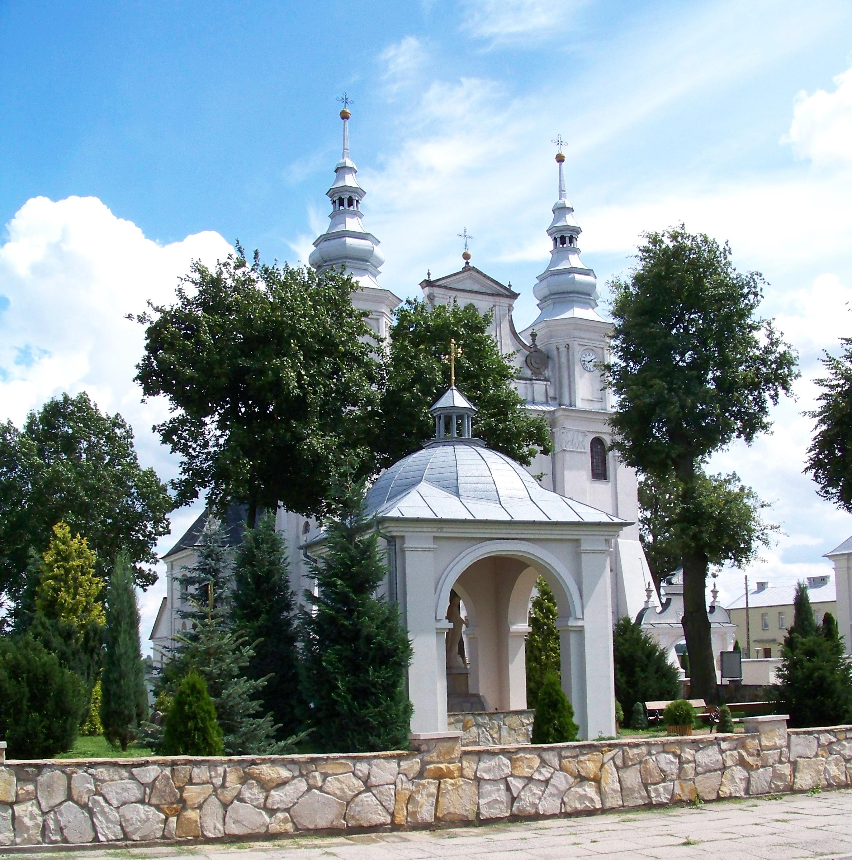 kościół, Jedlińsk